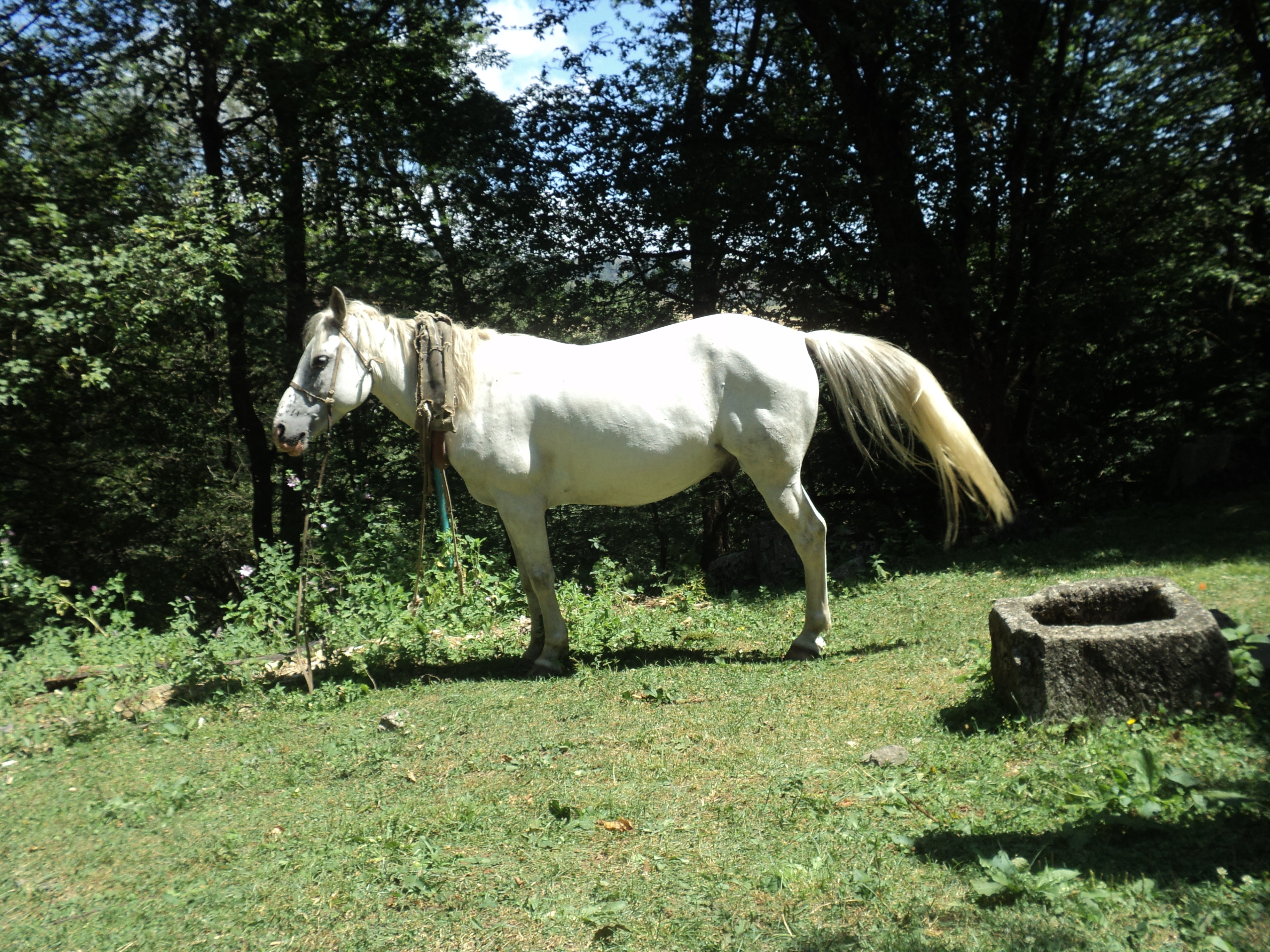 Մոլորված ձին Մաթոսավանքում